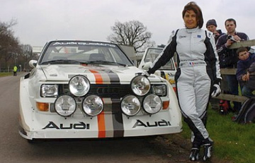 Michèle Mouton junto al Audi Quatto S1 con el que ganó el Pikes Peak International 1985. La foto fue tomada durante el International Historic Motorsport Show, en Stoneleigh Park, en Gran Bretaña.